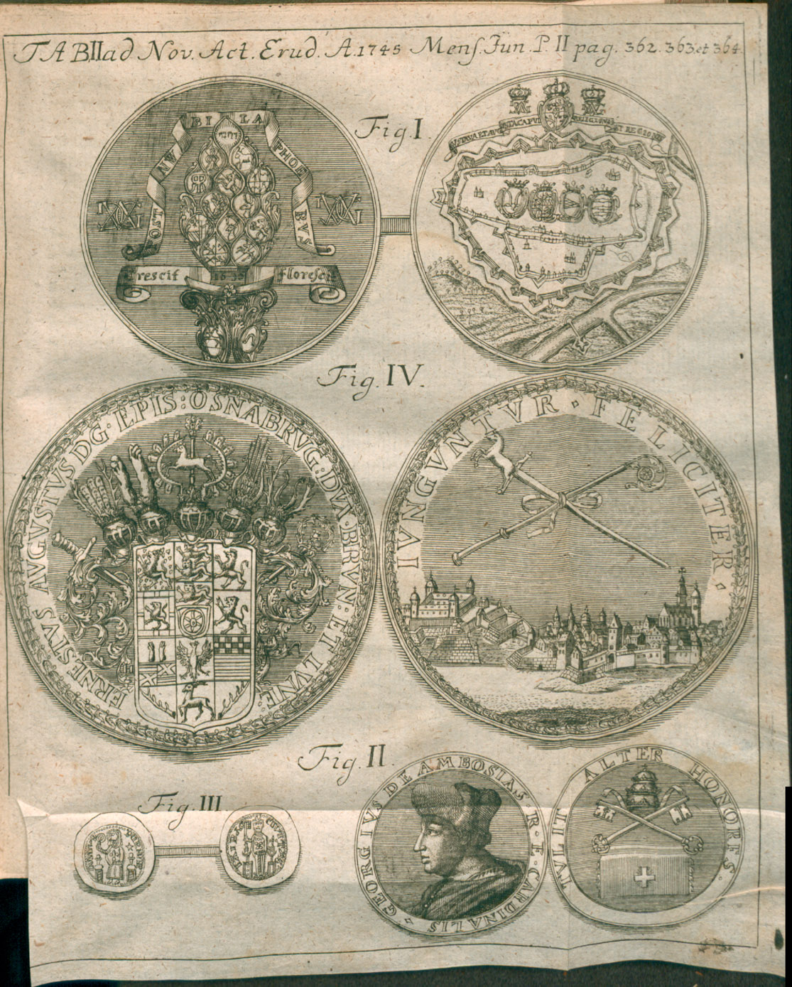 Illustration